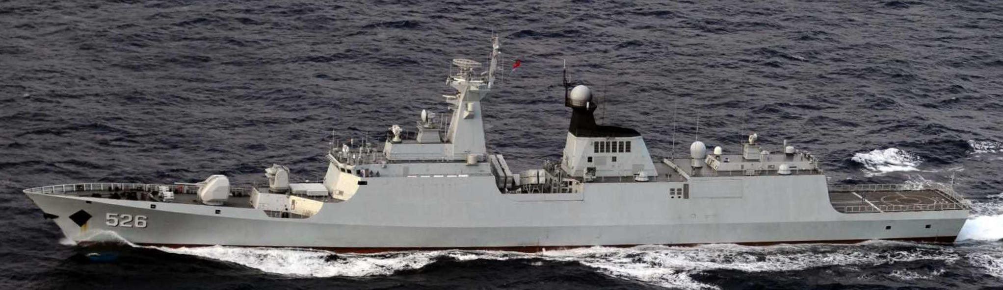 １２月１３日（日）午前５時頃、海上自衛隊第５航空群所属「Ｐ－３Ｃ」（那覇）が、宮古島の北東約１３０ｋｍの海域を東シナ海から太平洋に向けて南東進する中国海軍ジャンカイI級フリゲート２隻を確認した。また、当該艦艇が、同日午後１１時頃、与那国島の南約２２０ｋｍの海域を南西進するのを確認した。